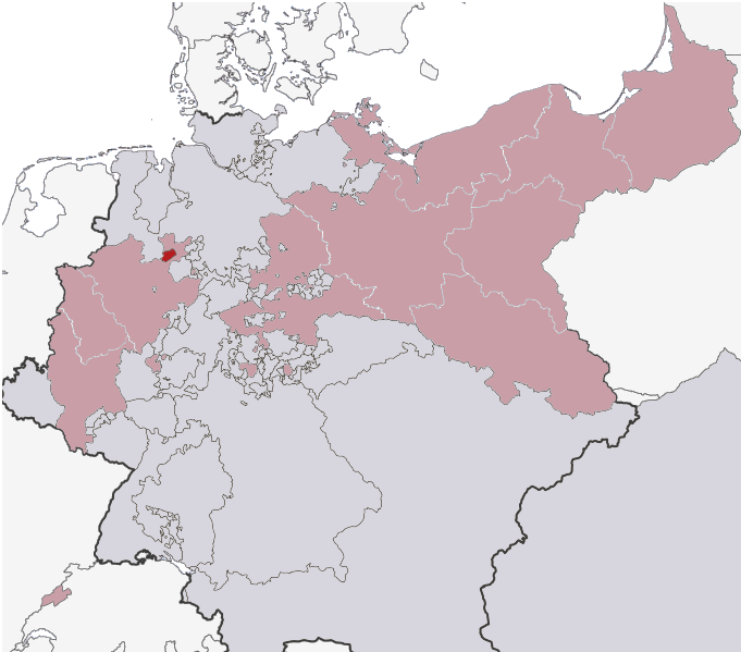 Kreis Bünde in Prussia as of 1818